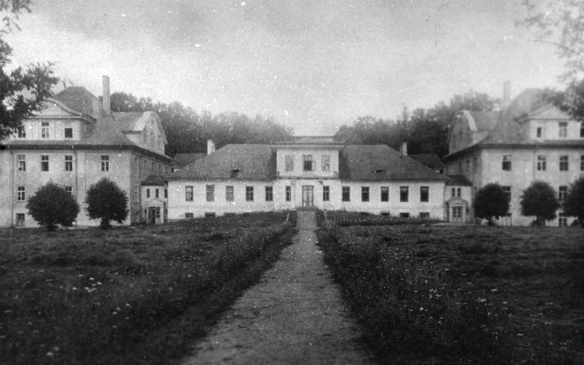 Malnavas muiža 1929.gads